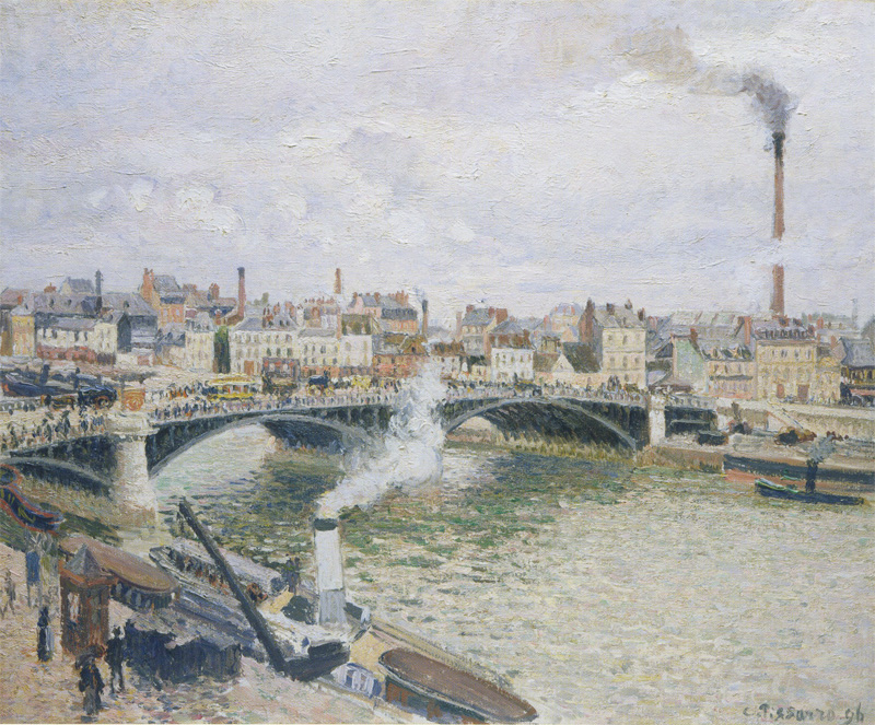 Camille Pissarro: „Le Pont Boieldieu à Rouen, matin, temps mouillé“, 1896. Metropolitan Museum of Art depuis 1980